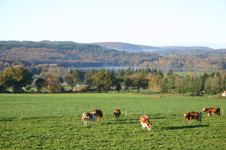 Recherche des bois autour de l'étang de Guerledan à côté de Mur de Bretagne